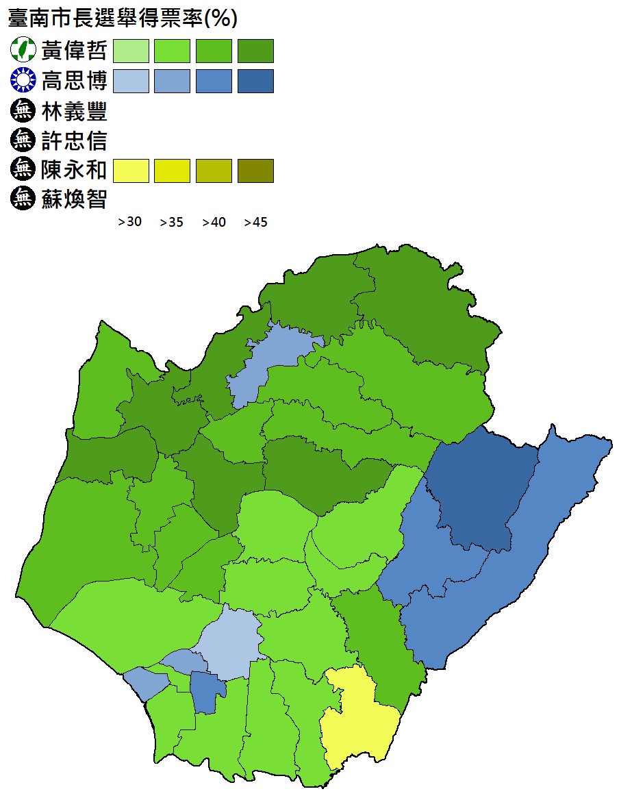 台南市長選舉得票分布。